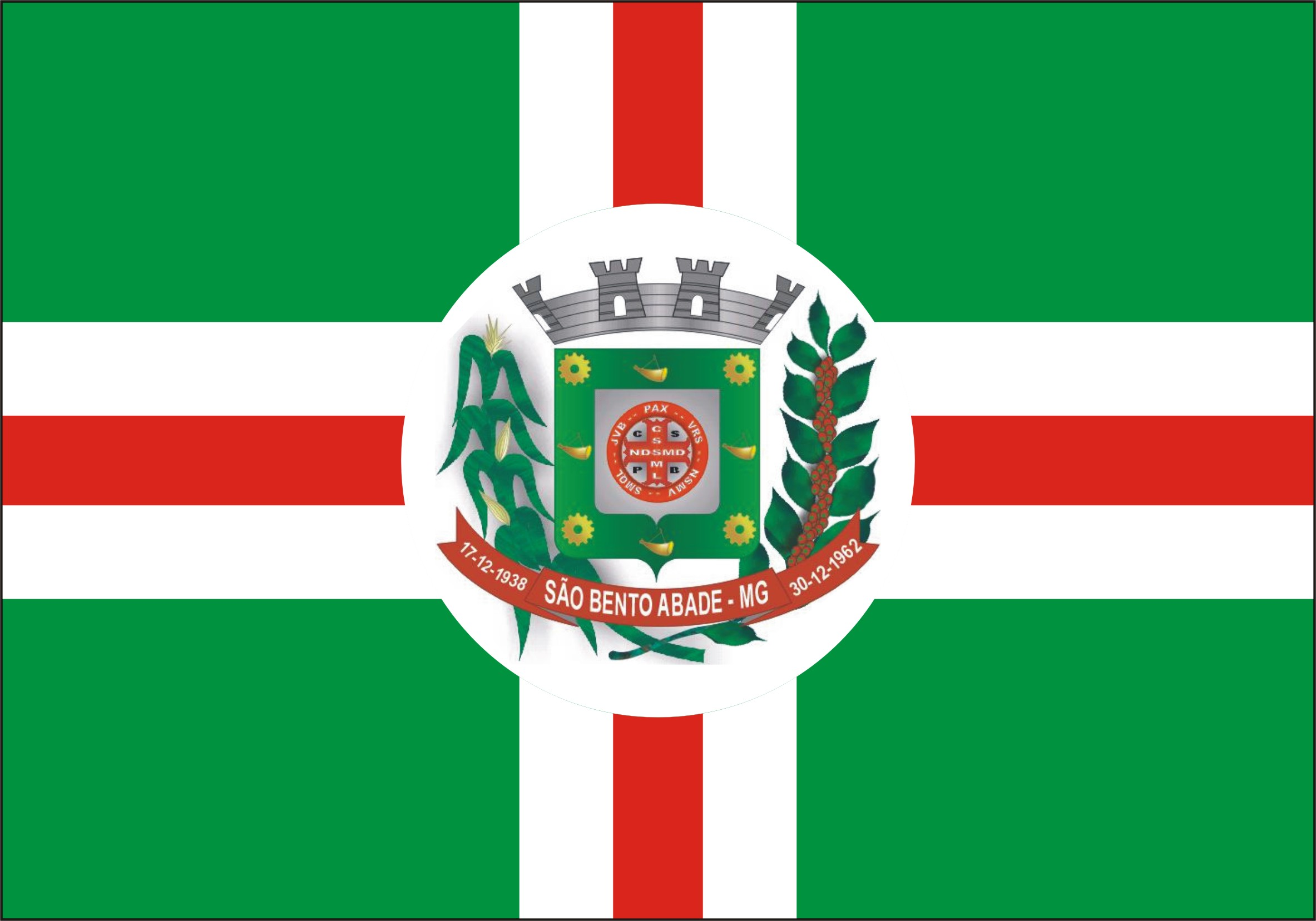 Bandeira do Município de São Bento Abade